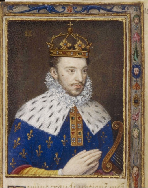 Henri III, roi de France et de Pologne, livre d'Heures de Catherine de Médicis